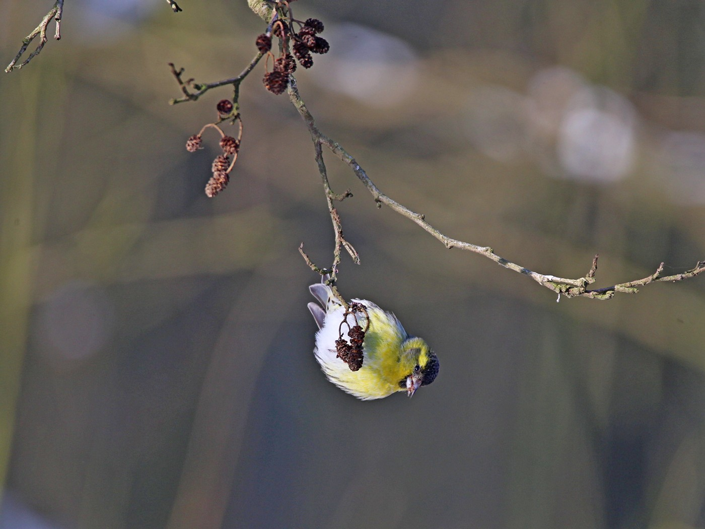 Erlenzeisig an Erlenast